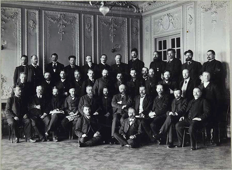 Групповой портрет политической фракции кадетов во 2-й Государственной думе. Фотография К. Булла. 1907 г. 32 х 26,4 см. Первый (передний) ряд (слева направо) А. З. Смагин А. С. Салазкин Второй ряд ? А. А. Савельев А. А. Кизеветтер Т. Т. Нороконев В. А. Богословский ? А. И. Шингарёв ? кн. Павел Долгоруков ? ? Р. Я. Смирнов Я. Н. Шапиро Третий ряд Н. М. Иорданский В. Е. Ваулин Ф. Д. Ланёв М. М. Кирьянов П.С. Леонас В. М. Гессен ? Б. Б. Каратаев ? А. А. Стахович П. Н. Никитин ? Ф. И. Галунов Н. М. Волоцкой ? Четвёртый (задний) ряд ? А. О. Горев Д. П. Пуговишников П. Юрашевскис К.Ю. Карклин Л. Г. Рабинович Д. А. Кушников ? Е. Г. Герасимов П. Е. Юницкий ? П. Н. Попов П. П. Юренев